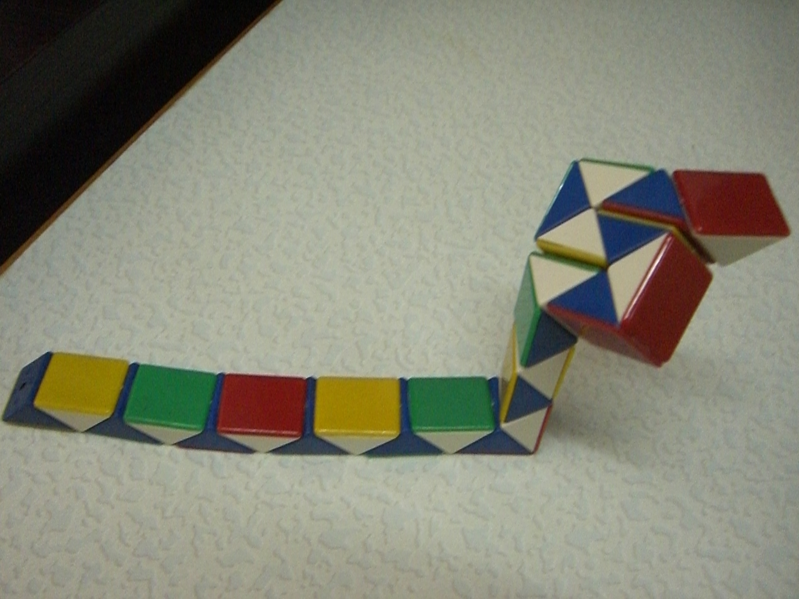 中文（香港）: 扭計蛇(魔尺) 眼鏡蛇形態